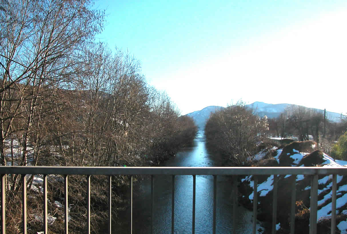 Foce del Vedeggio a Agno